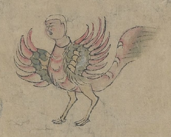 敦煌残卷《白泽精怪图》插图